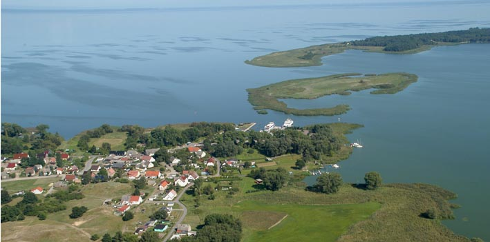 Das kleine Fischerdörfchen Altwarp aus der Vogelperspektive